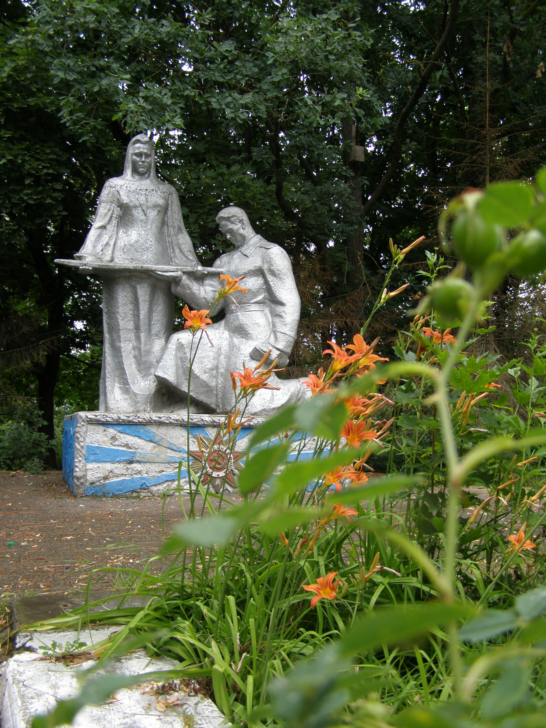 Пам’ятник 165 воїнам – односельчанам, загиблим на фронтах ВВВ, Тарасівка, біля Будинку культури